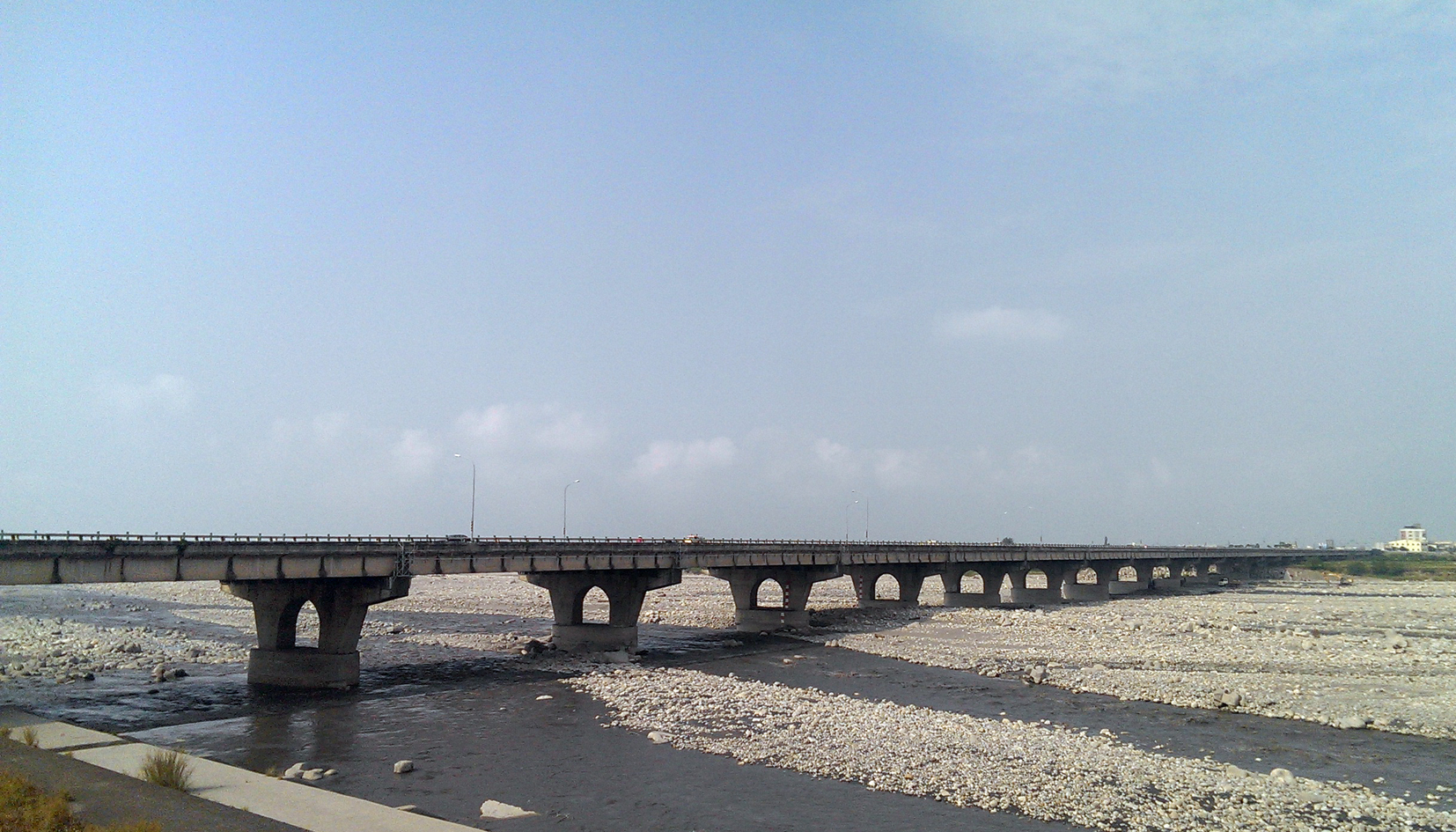 中文（台灣）: 大甲區大安溪橋